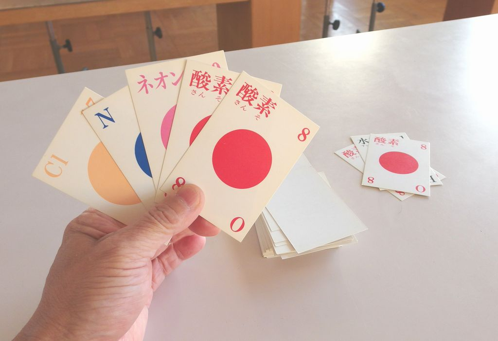 原子カードを用いて分子を作るカードゲーム。UNOと似ている。